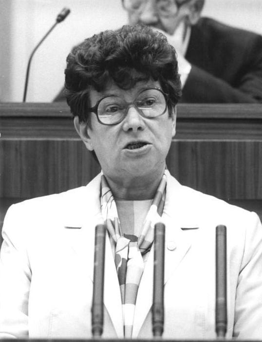 ADN-ZB Settnik 8.6.1989 Berlin: Volkskammer Während der 9. Tagung der Volkskammer der DDR ergriff Rosel Walther, Vorsitzende des Ausschusses für Haushalt und Finanzen, das Wort.